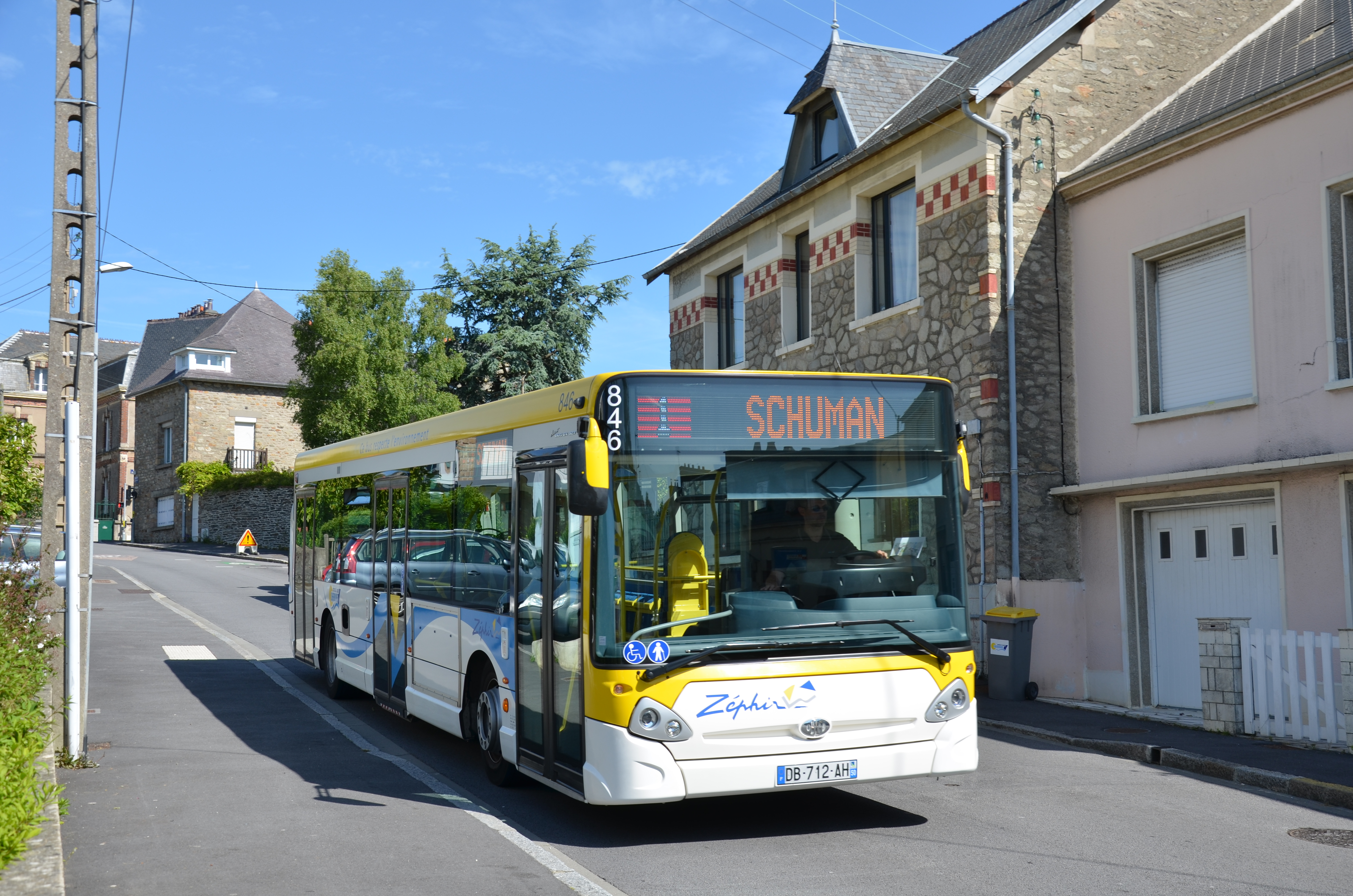 Heuliez GX 327 n°846 sur la ligne 1 du réseau Zéphir Bus de Cherbourg, près de l'arrêt Le Conquérant.